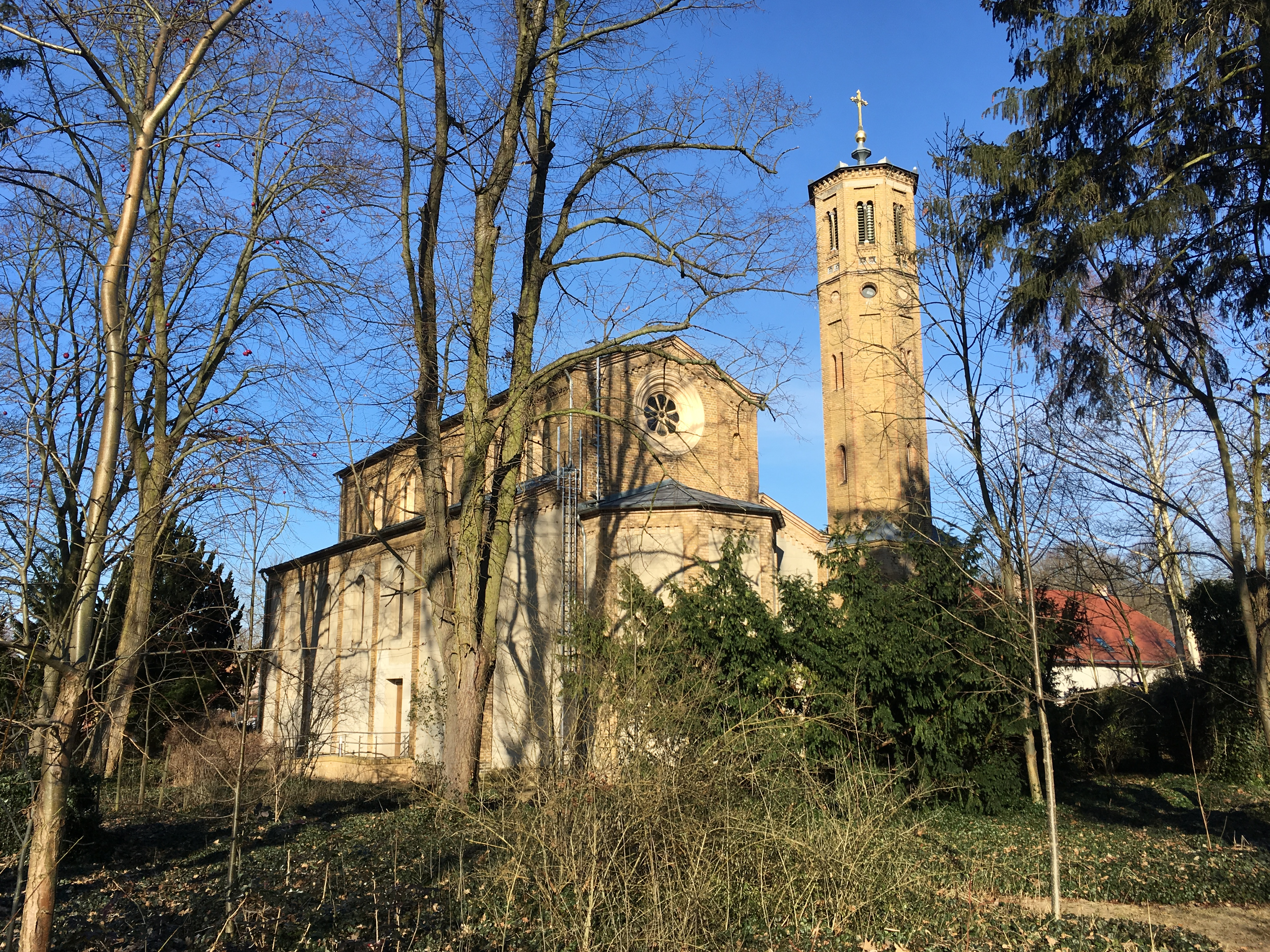 Die Dorfkirche Caputh entstand in den Jahren 1850 bis 1852 nach einem Entwurf von Friedrich August Stüler im Stil des Historismus. Die Ausstattung ist bauzeitlich. Die Taufschale aus der Zeit um 1840 wurde aus Porzellan in KPM in Berlin nach einem Entwurf Schinkels hergestellt.